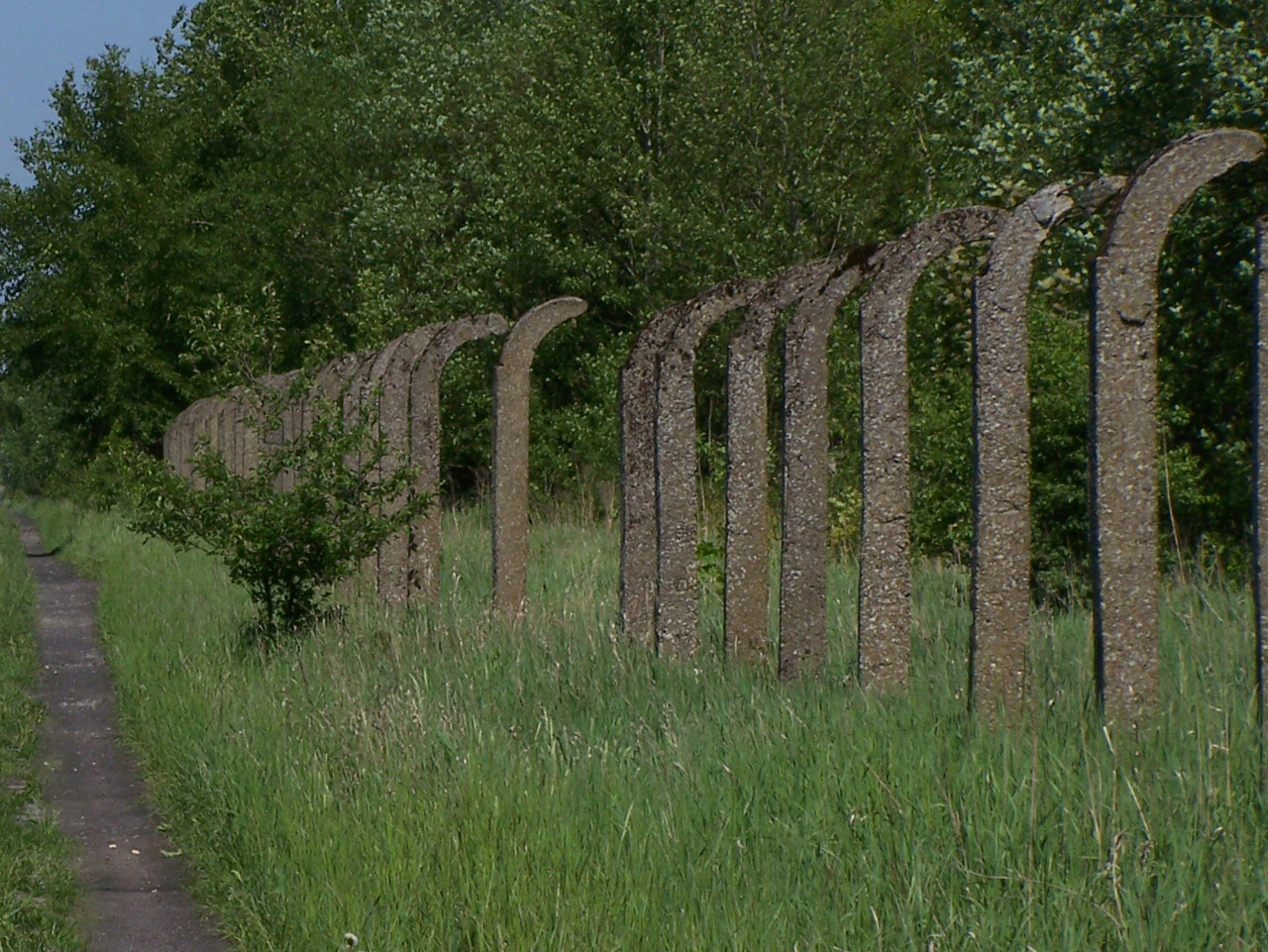 Pozostałości po ogrodzeniu Fabryki benzyny syntetycznej w Policach